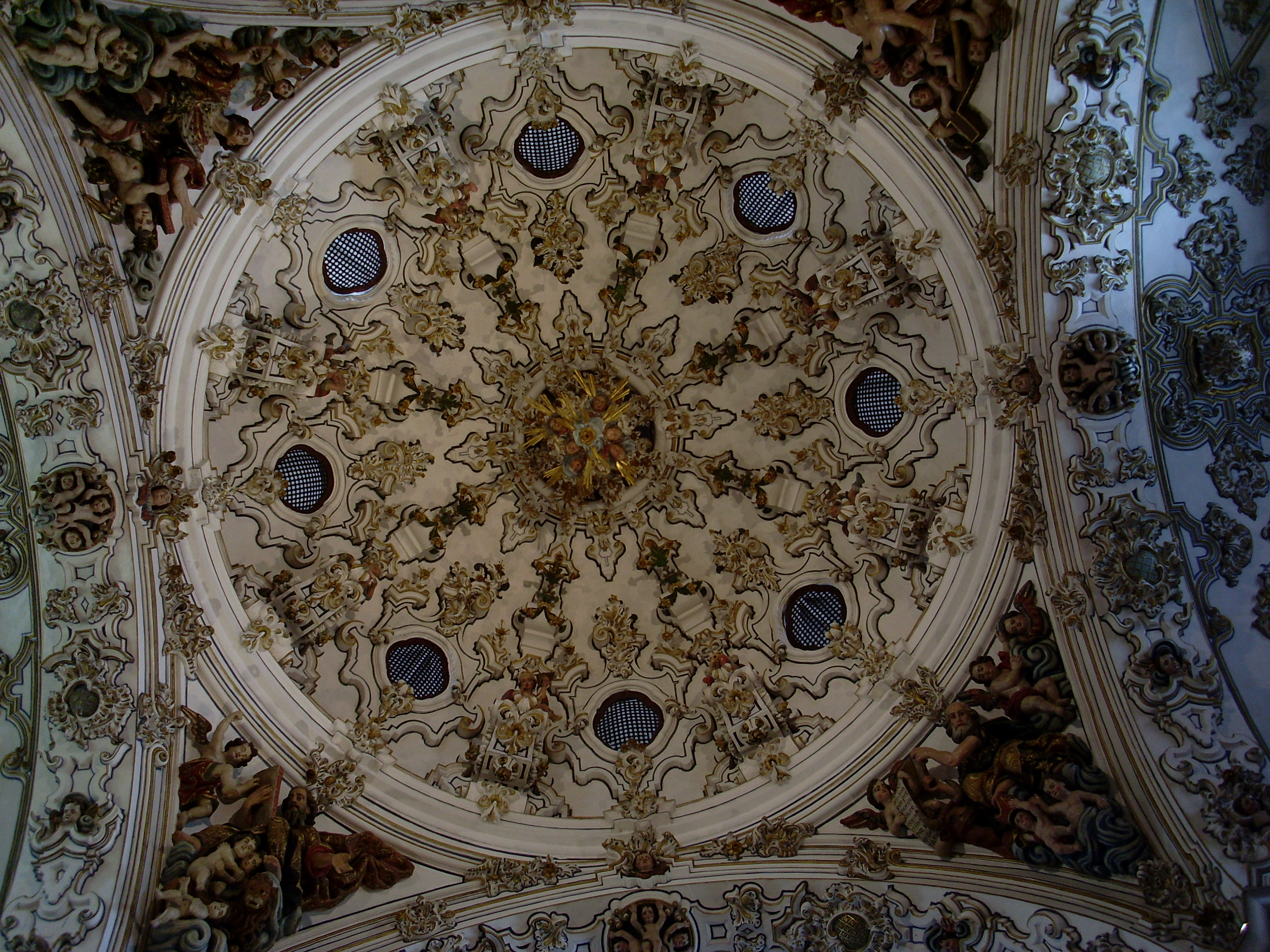 Boveda barroca de la Iglesia de la Limpia Concepción de Nuestra Señora de Écija.